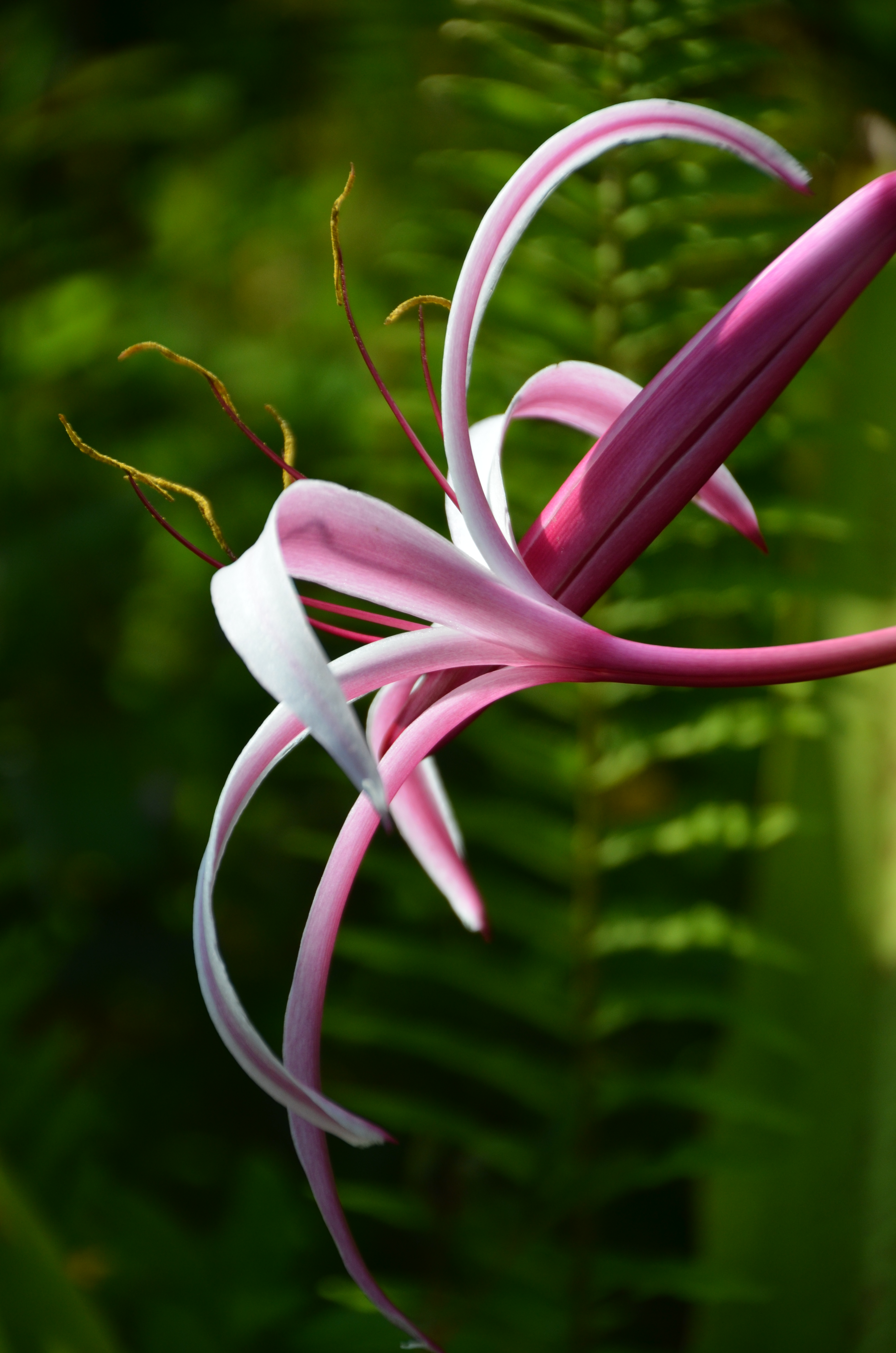 Crinum augustum (